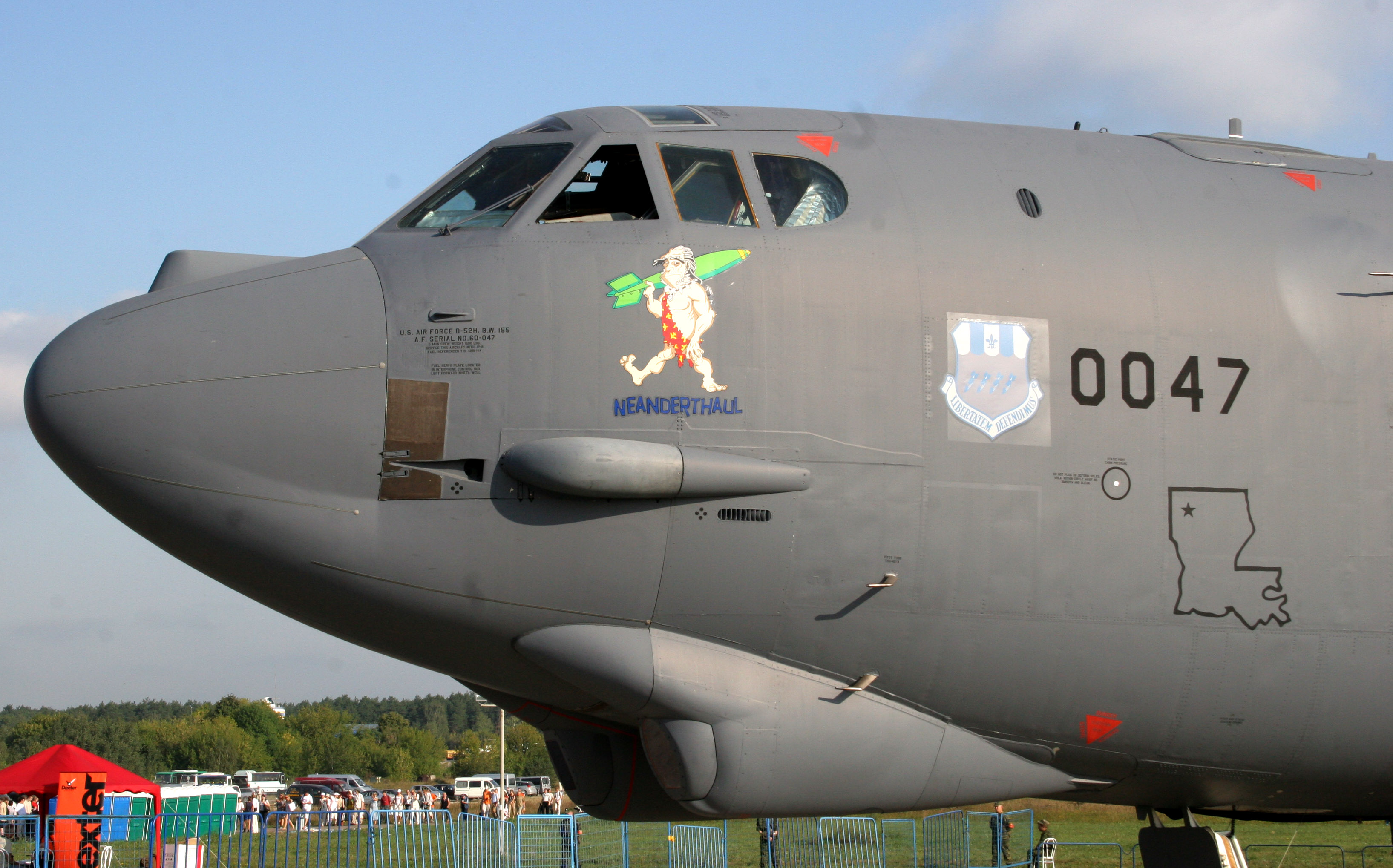 Самолёт B-52 Stratofortress. Экспозиция на МАКС-2007